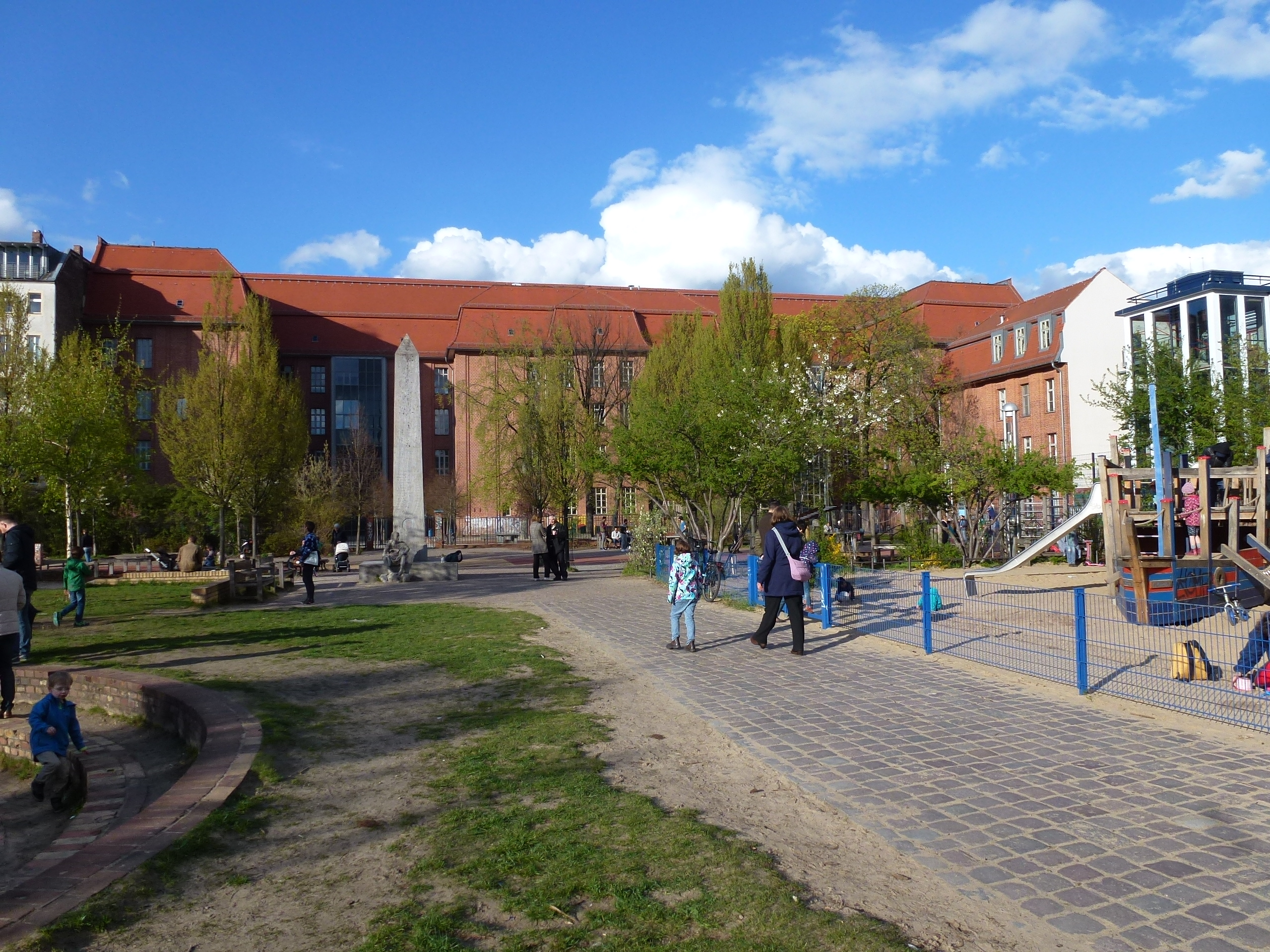 Berlin-Prenzlauer Berg Marienburger Straße Spielplatz